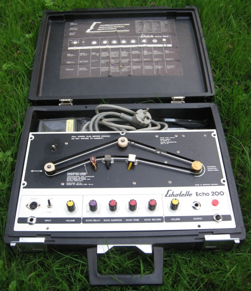 Foto des Bandhallgeräts Echolette Echo 200